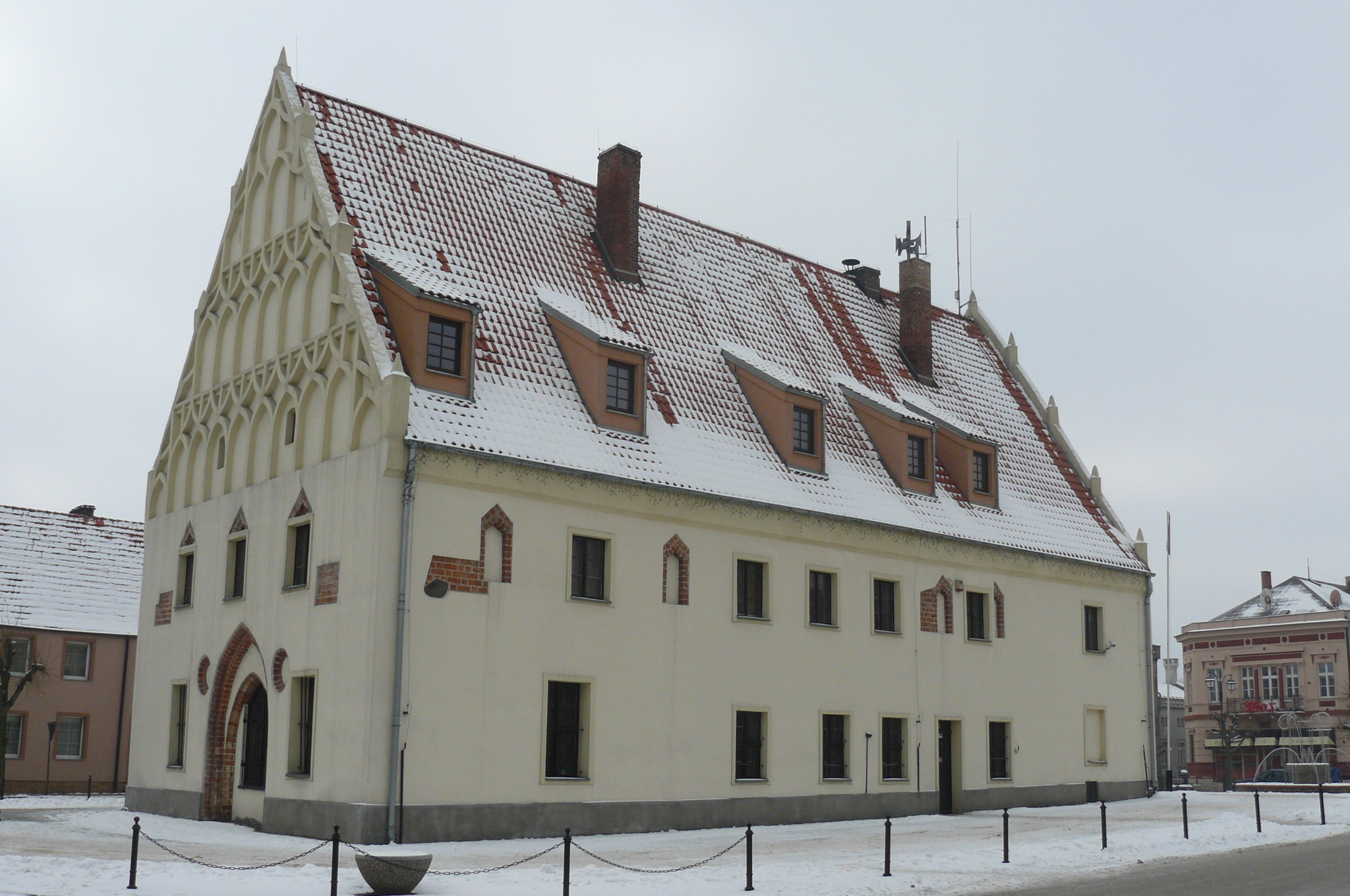 Ratusz w Trzcińsku Zdroju.